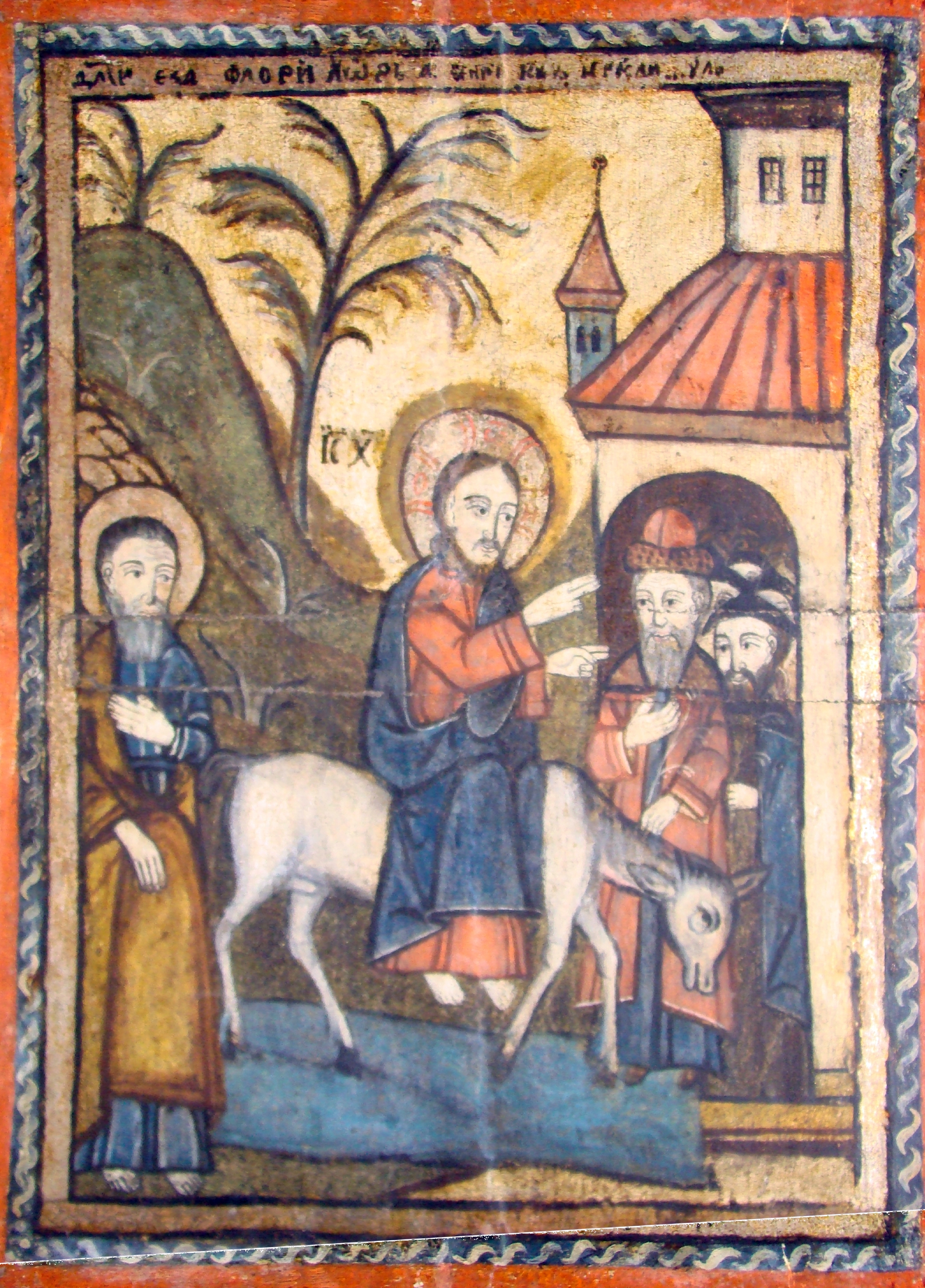 Biserica de lemn din Budești-Josani, județul Maramureș